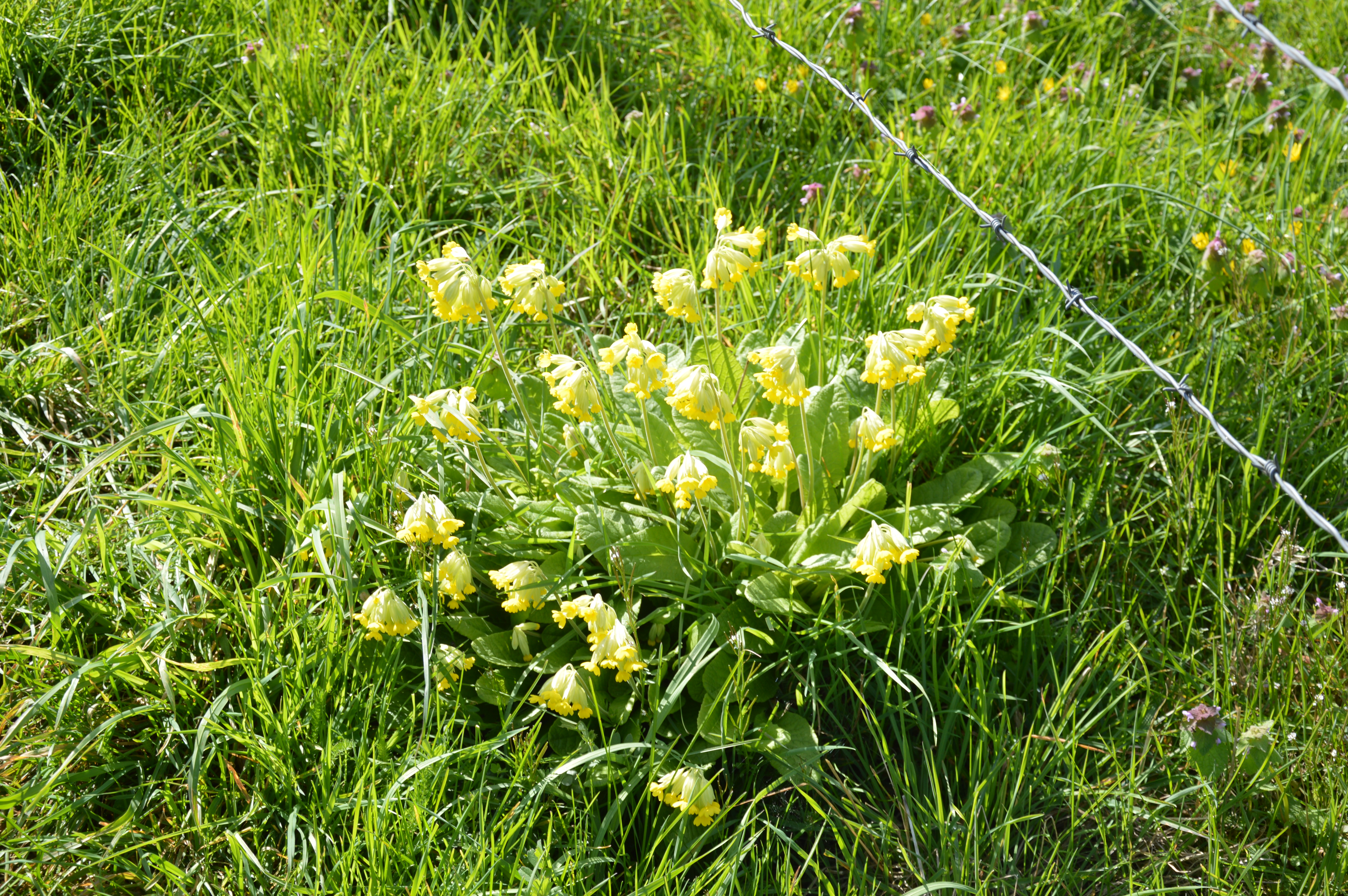 Coucou - primevère officinale - dans la vallée de la Divatte (France 44)